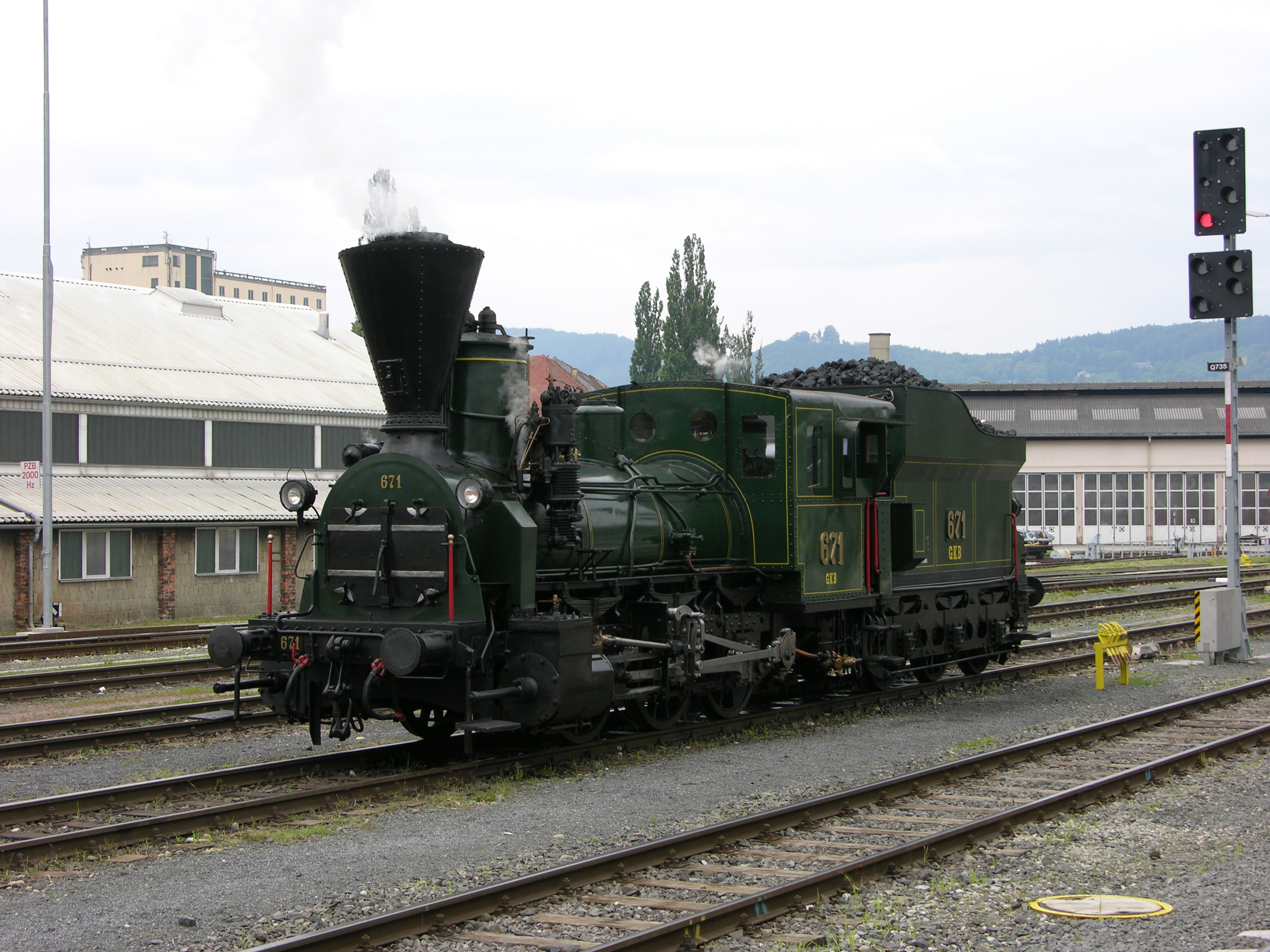 GKB 671 am Graz Köflacherbahnhof